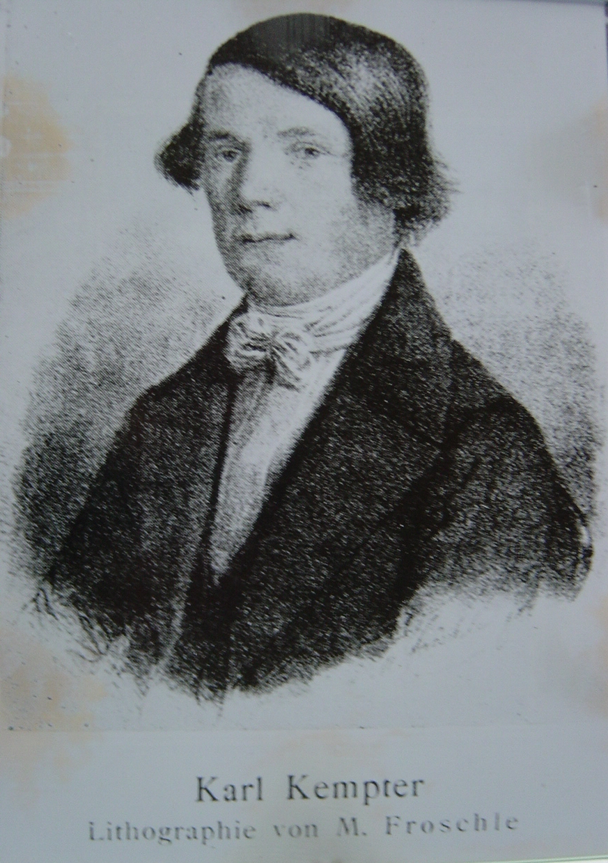 Lithografie des Komponisten und Kirchenmusikers Karl Kempter.